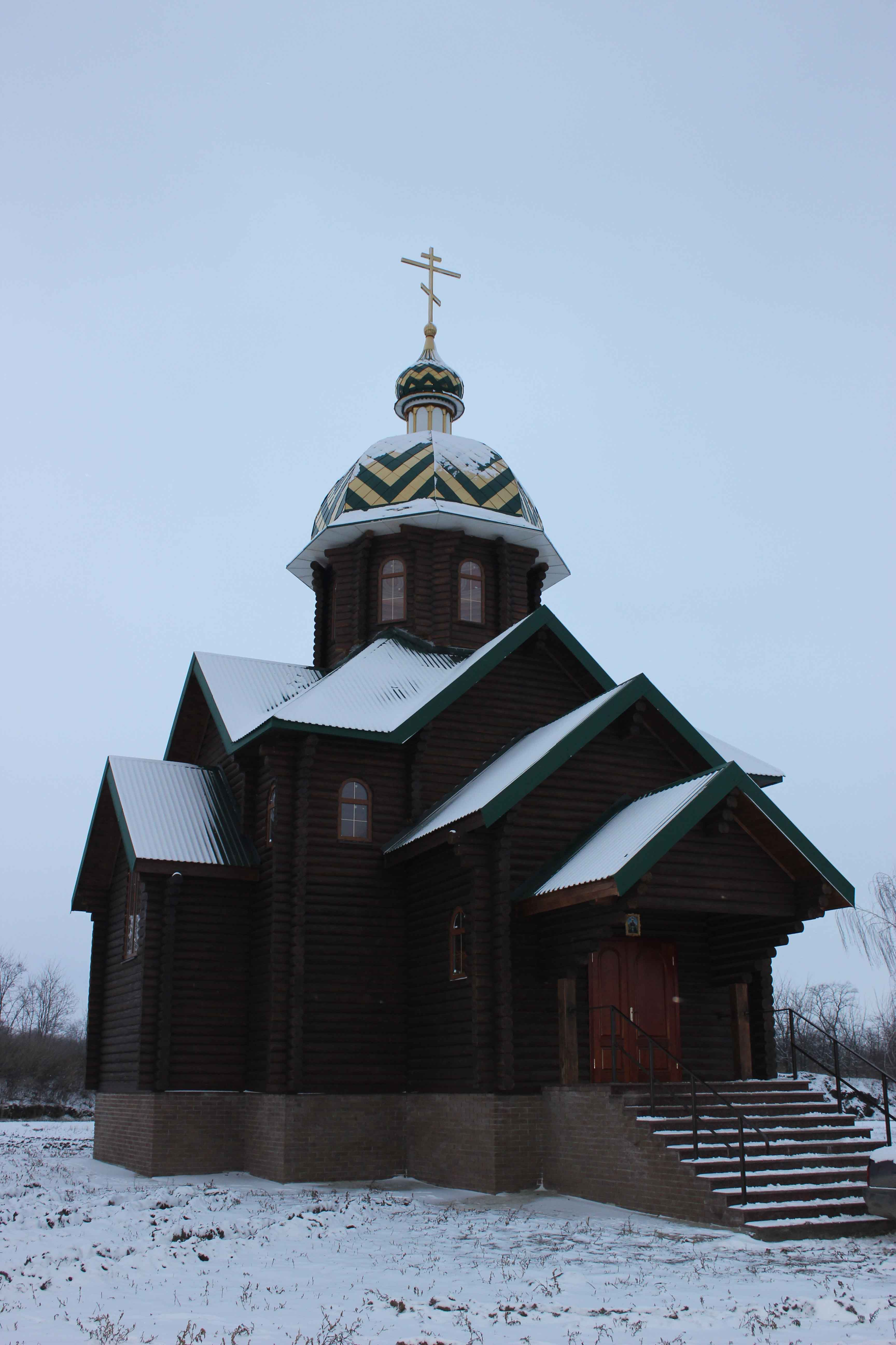 В селі Каніж завершується будівництво храму мучениць Віри, Надії, Любові та матері їхньої Софії